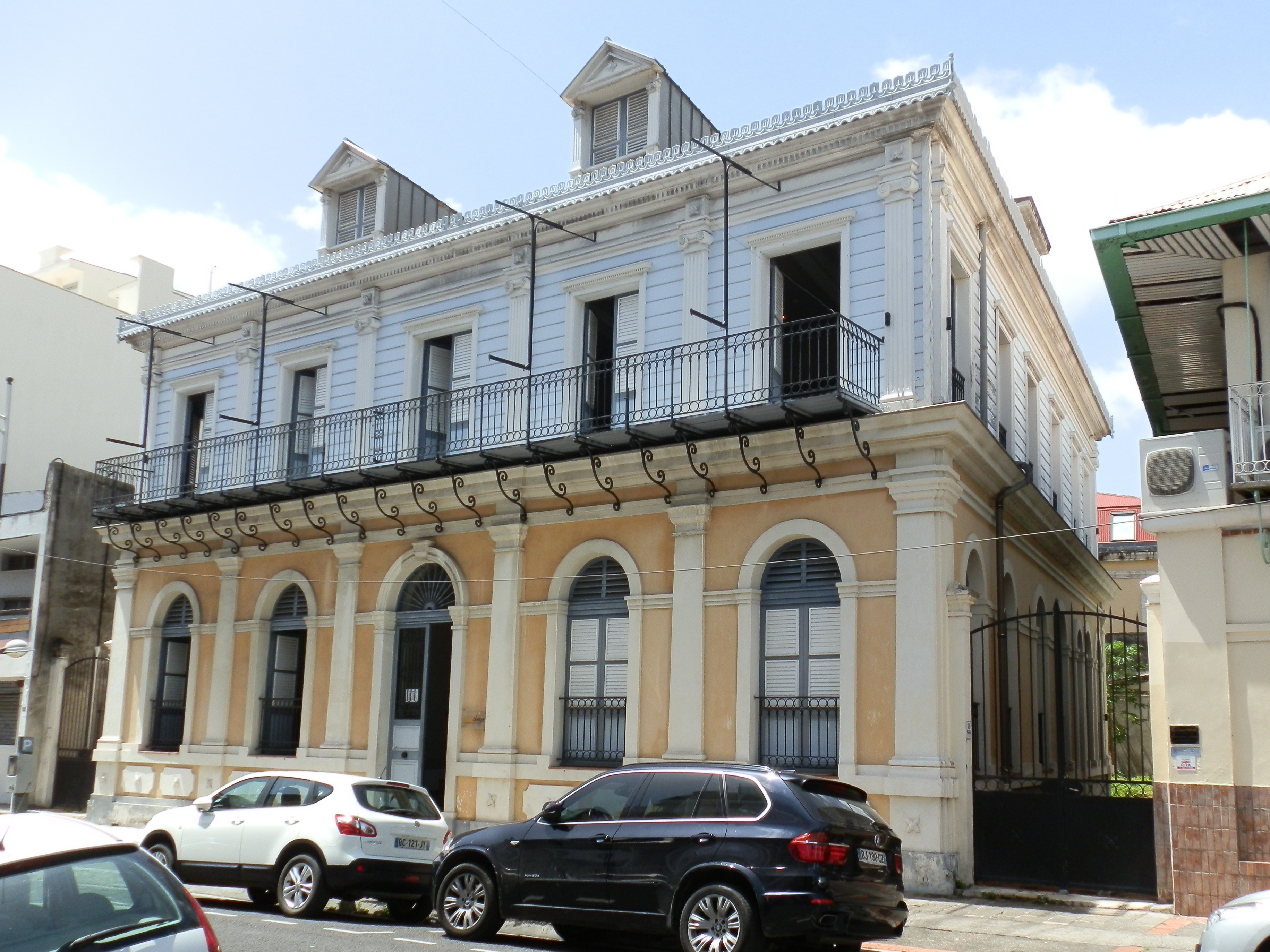 Ancien hôtel de ville de Pointe-à-Pitre, actuellement médiathèque A. R. Boisneuf